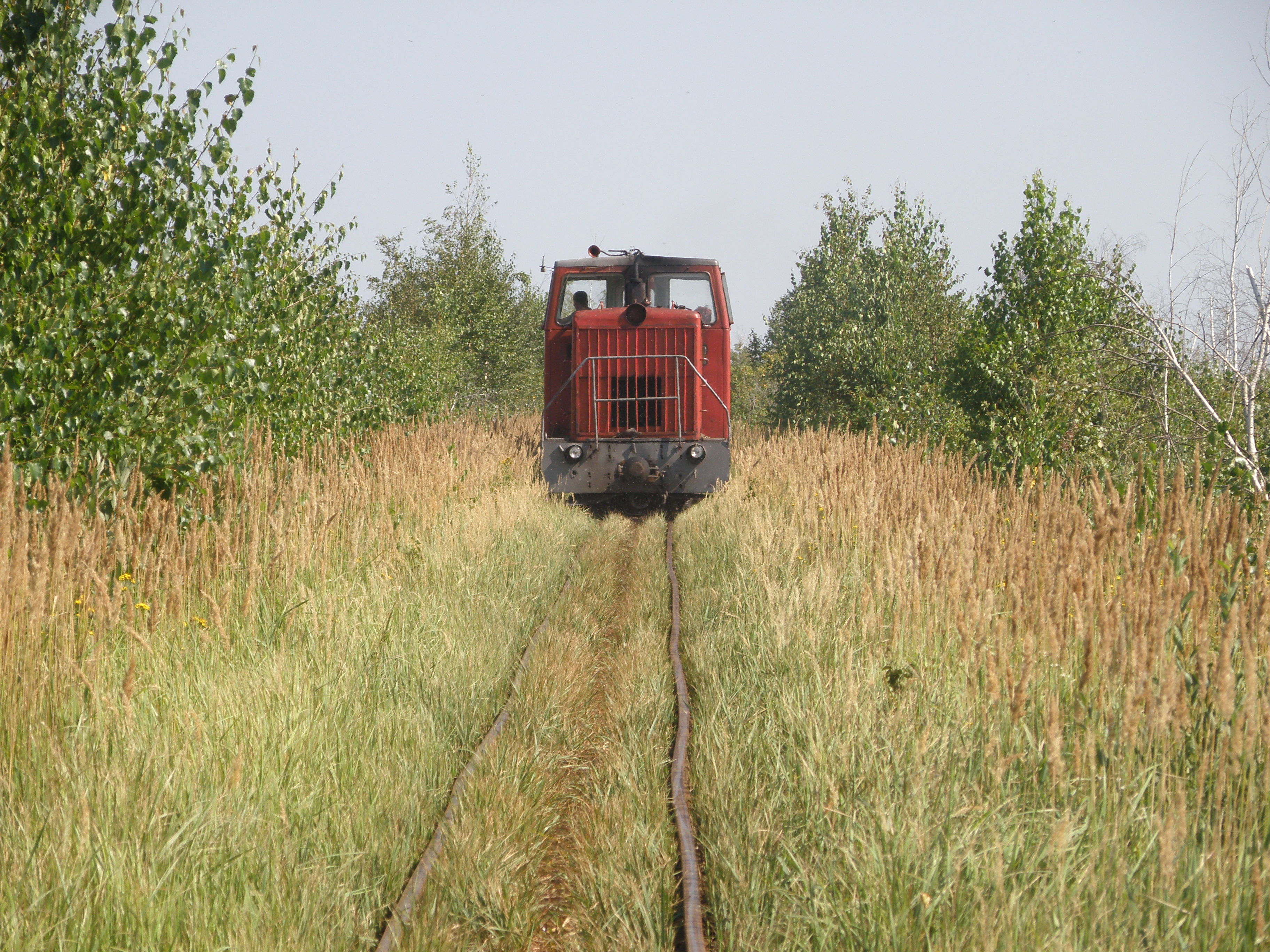 Узкоколейка от Мезиновского до Нармучи